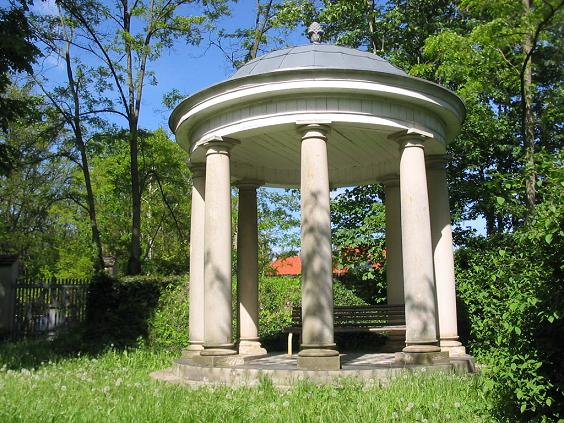 Schloss Blankensee, Rundtempel / Brandenburg